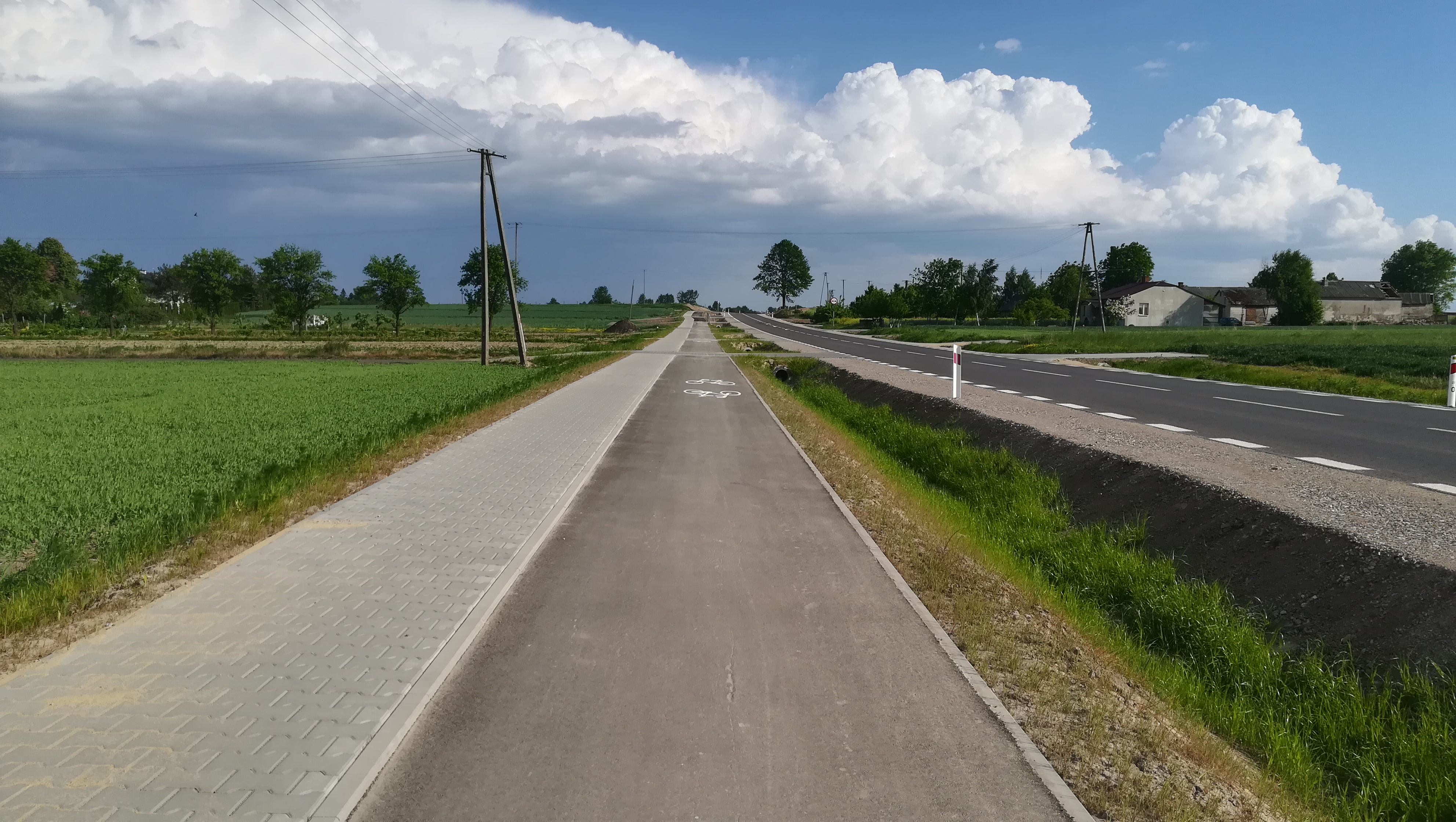 Chodnik i droga rowerowa przy wyremontowanym odcinku drogi wojewódzkiej 835 w Piotrkowie Pierwszym.